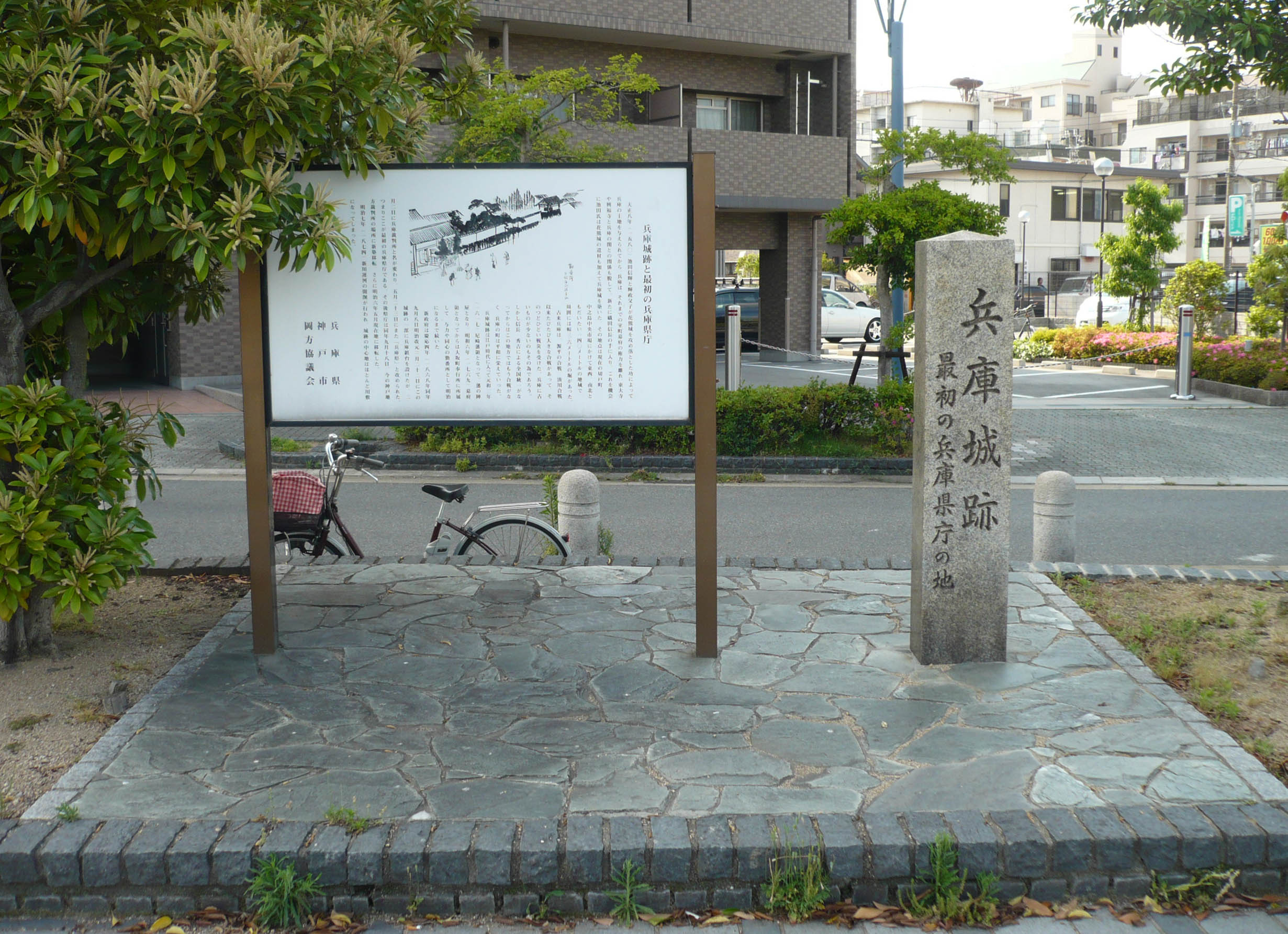 兵庫城の石碑と案内看板